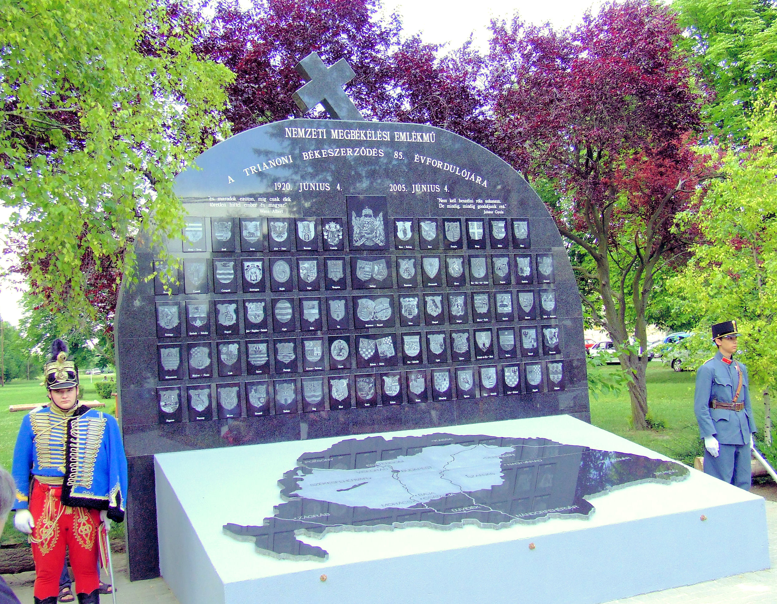 Nemzeti Megbékélés Emlékmű Csátalján